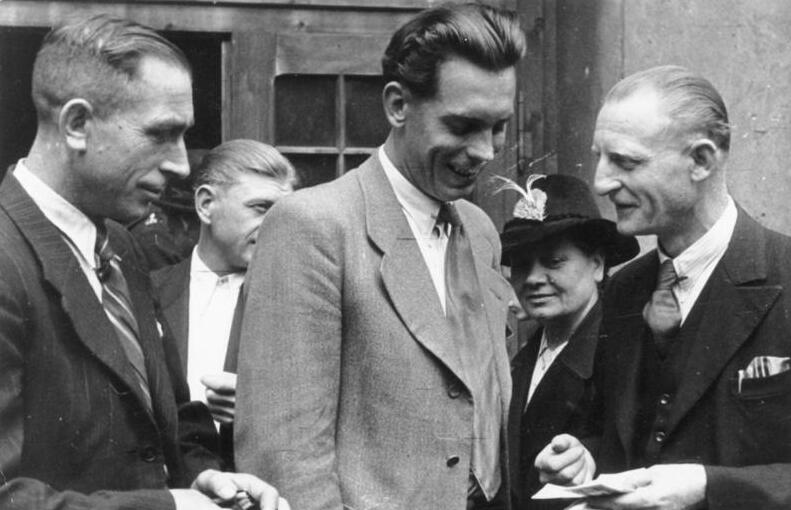 Essen, Währungsreform Ausgabe des neuen Geldes in Westdeutschland [ in Essen] Das neue Geld wird .... in Augenschein genommen und besprochen. 1707-48